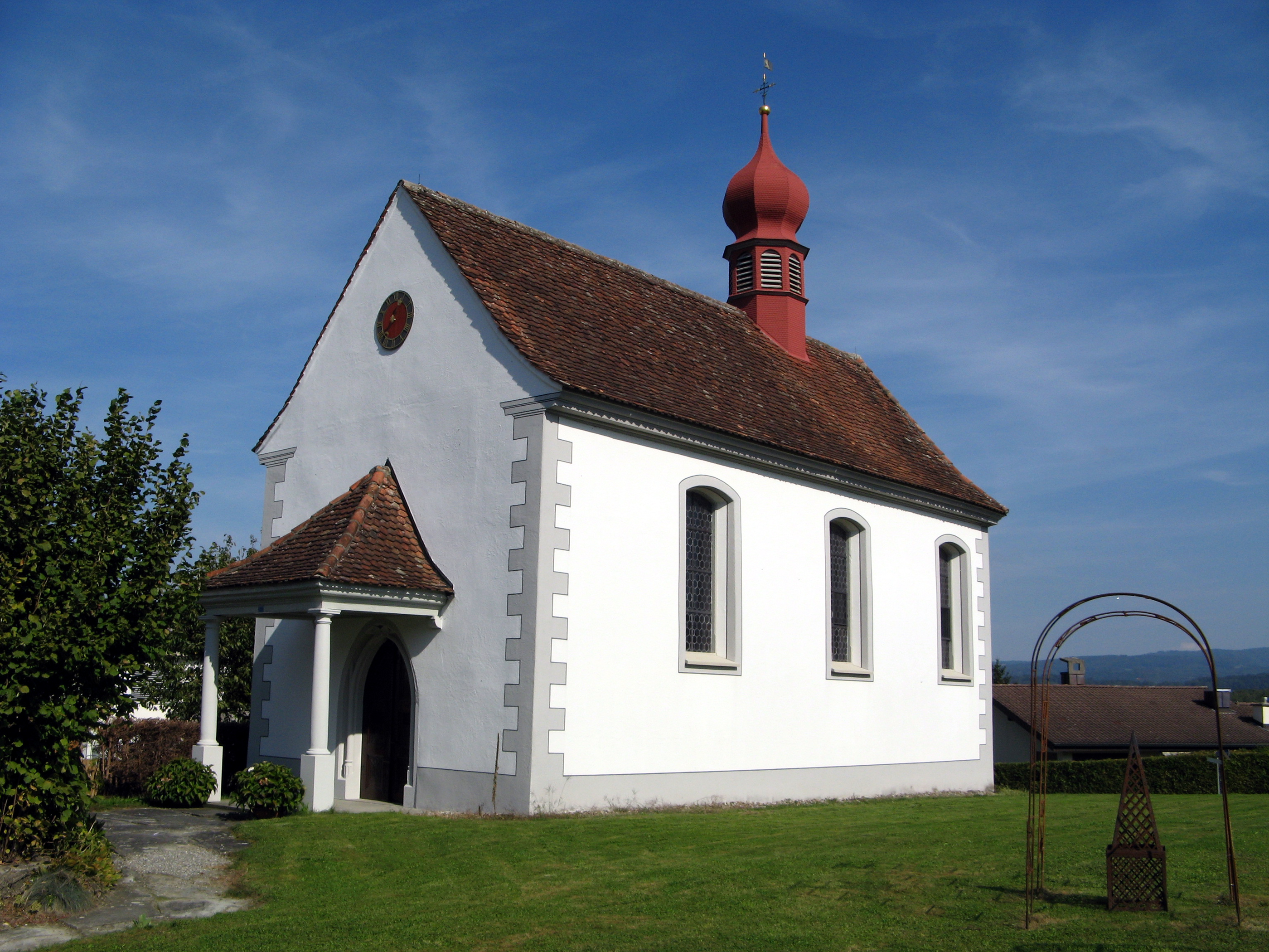 Johanneskapelle in Aristau, seitliche Ansicht